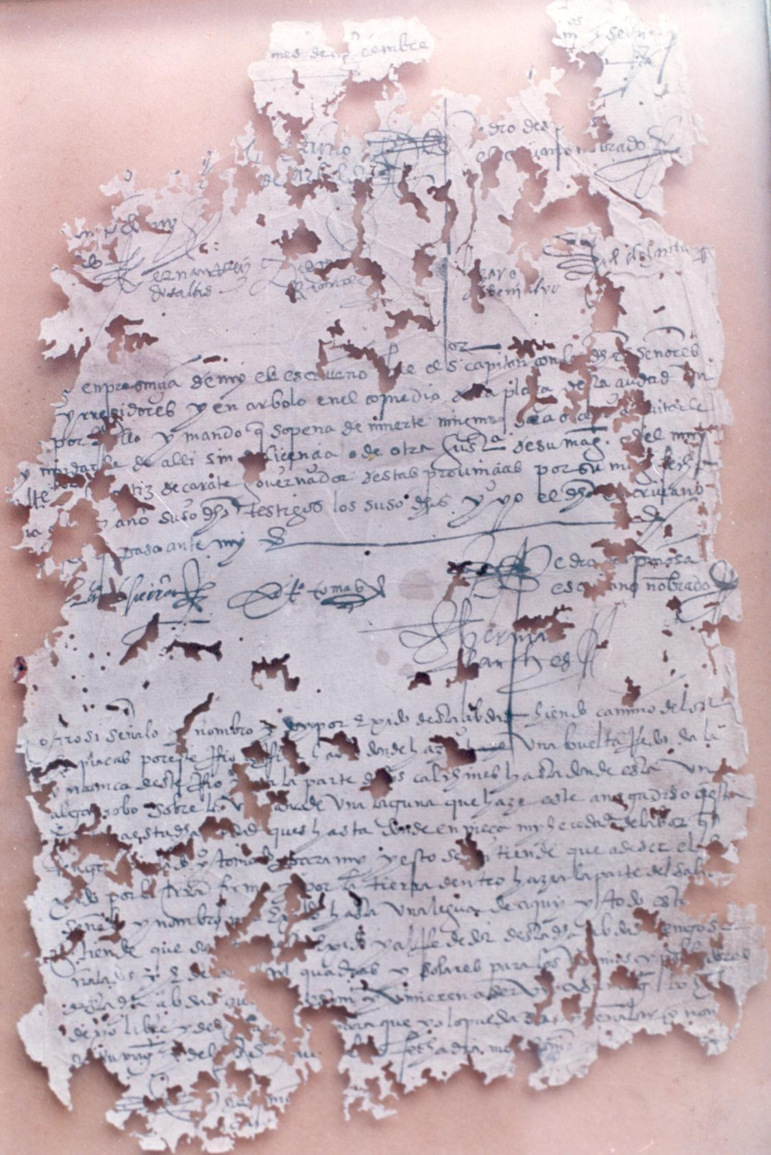 Acta de Fundación de Santa Fe - Se la puede apreciar en el museo de Historia de la Provincia de Santa Fe - Ciudad de Santa Fé, Argentina